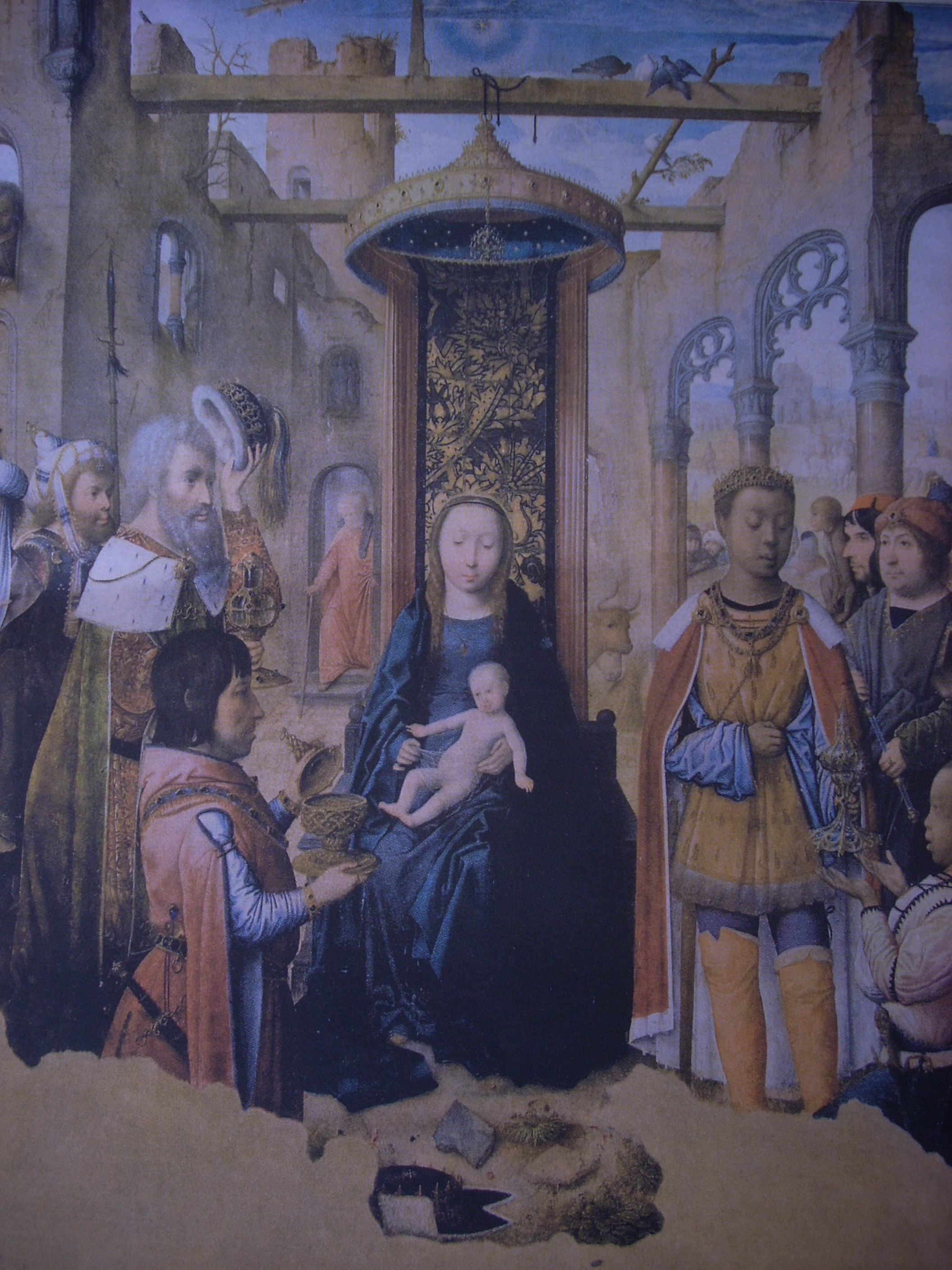 "La adoración de los magos", por Juan de Flandes, iglesia parroquial de Cervera de Pisuerga, Palencia, España.